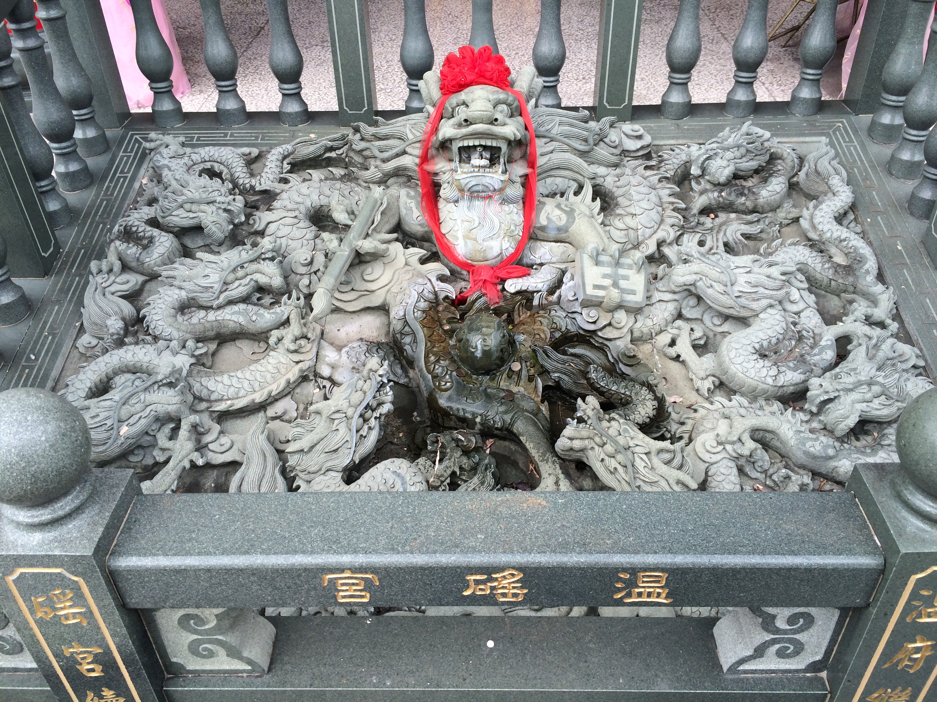 中文（台灣）: 溫磘宮 九龍御路